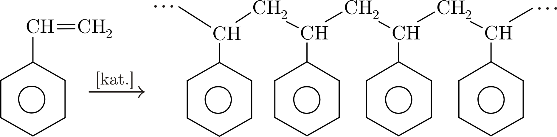 polystyrene